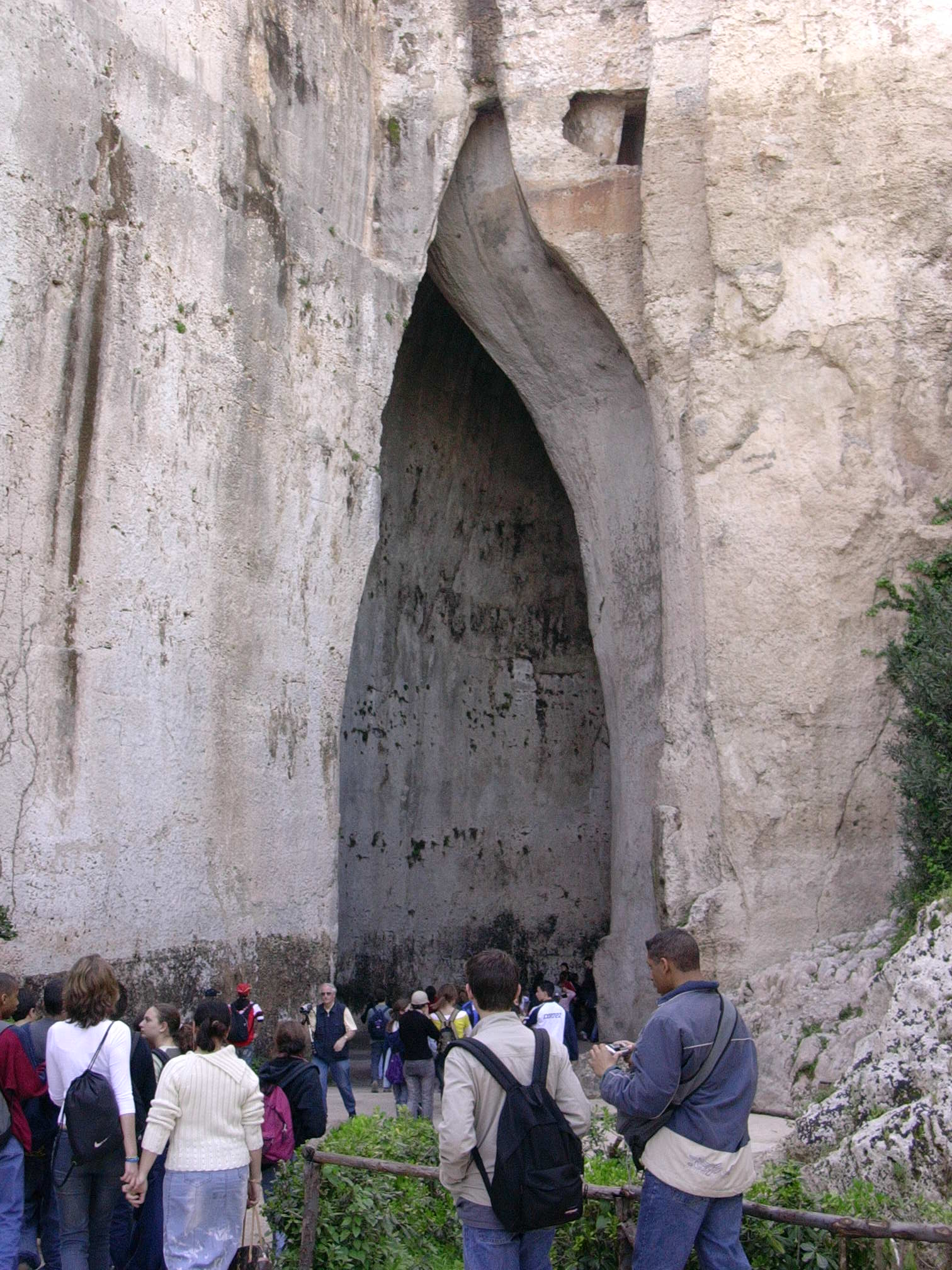 c. Guilhem Dulous